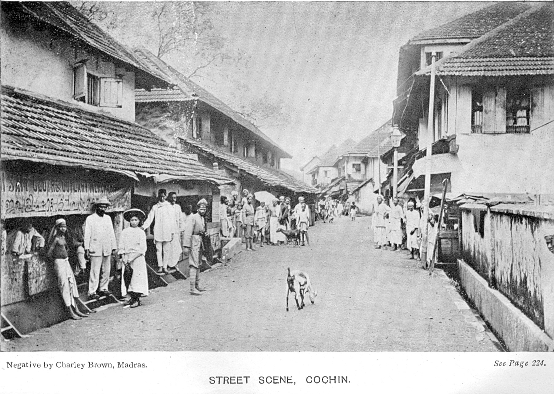 Cochin Street Scene